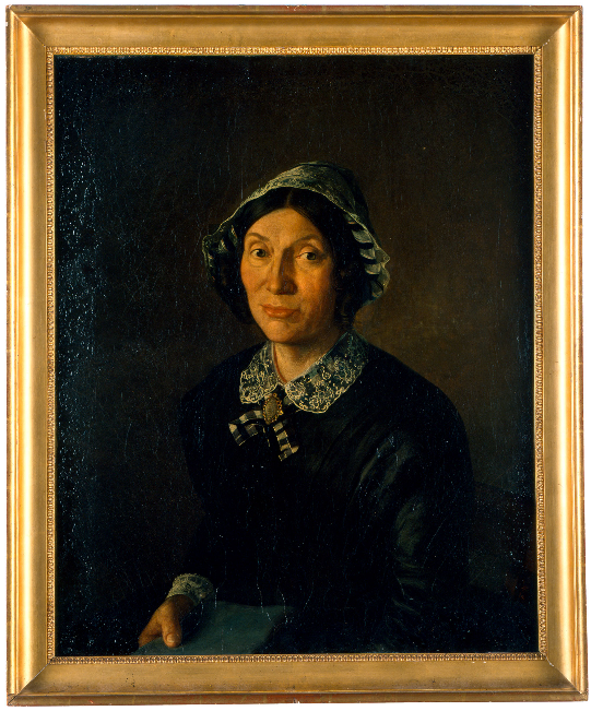 Bildnis Henriette Bitzius-Zeender (1805-1872).